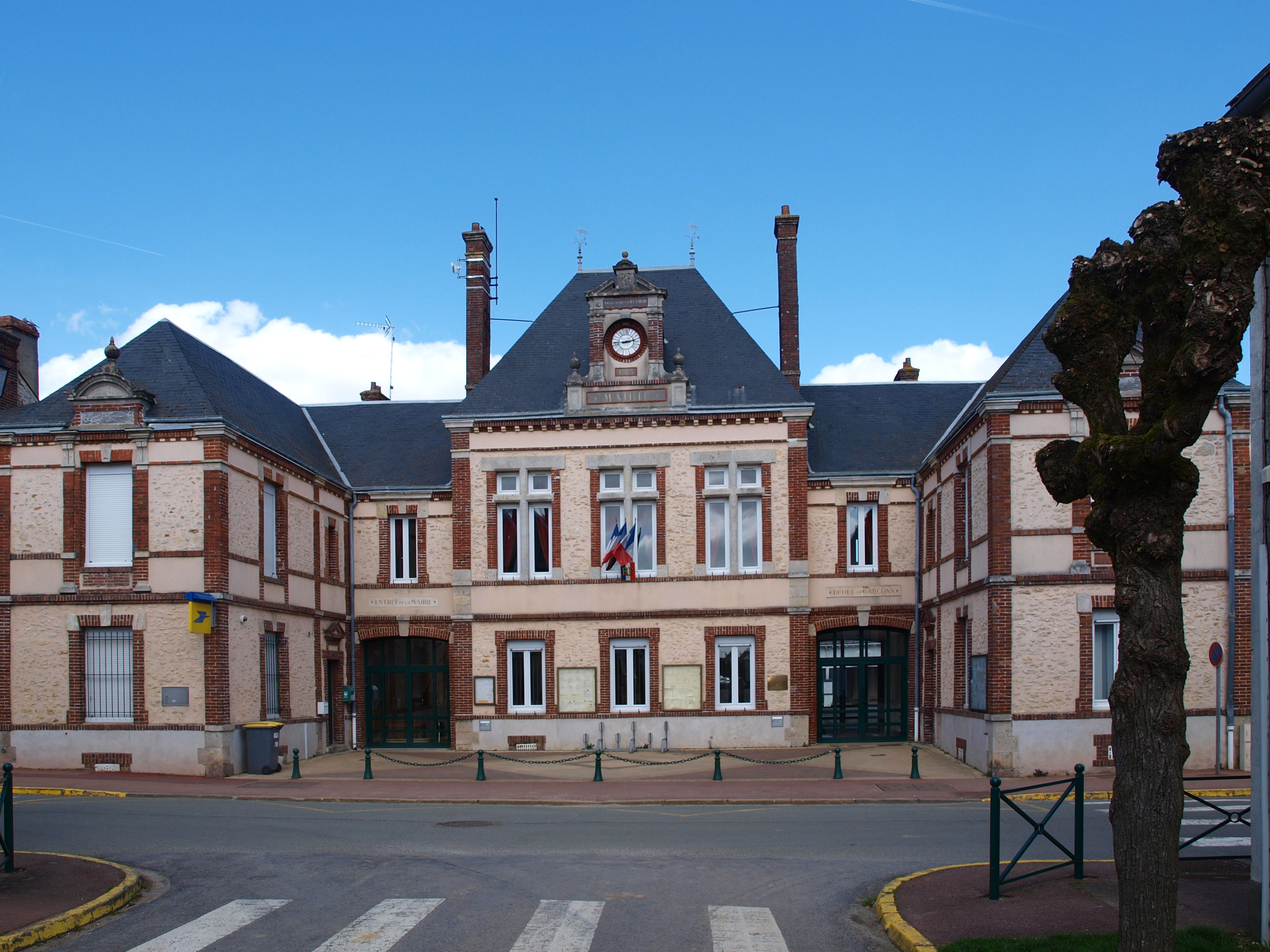 Sainville (Eure-et-Loir, France) ; mairie